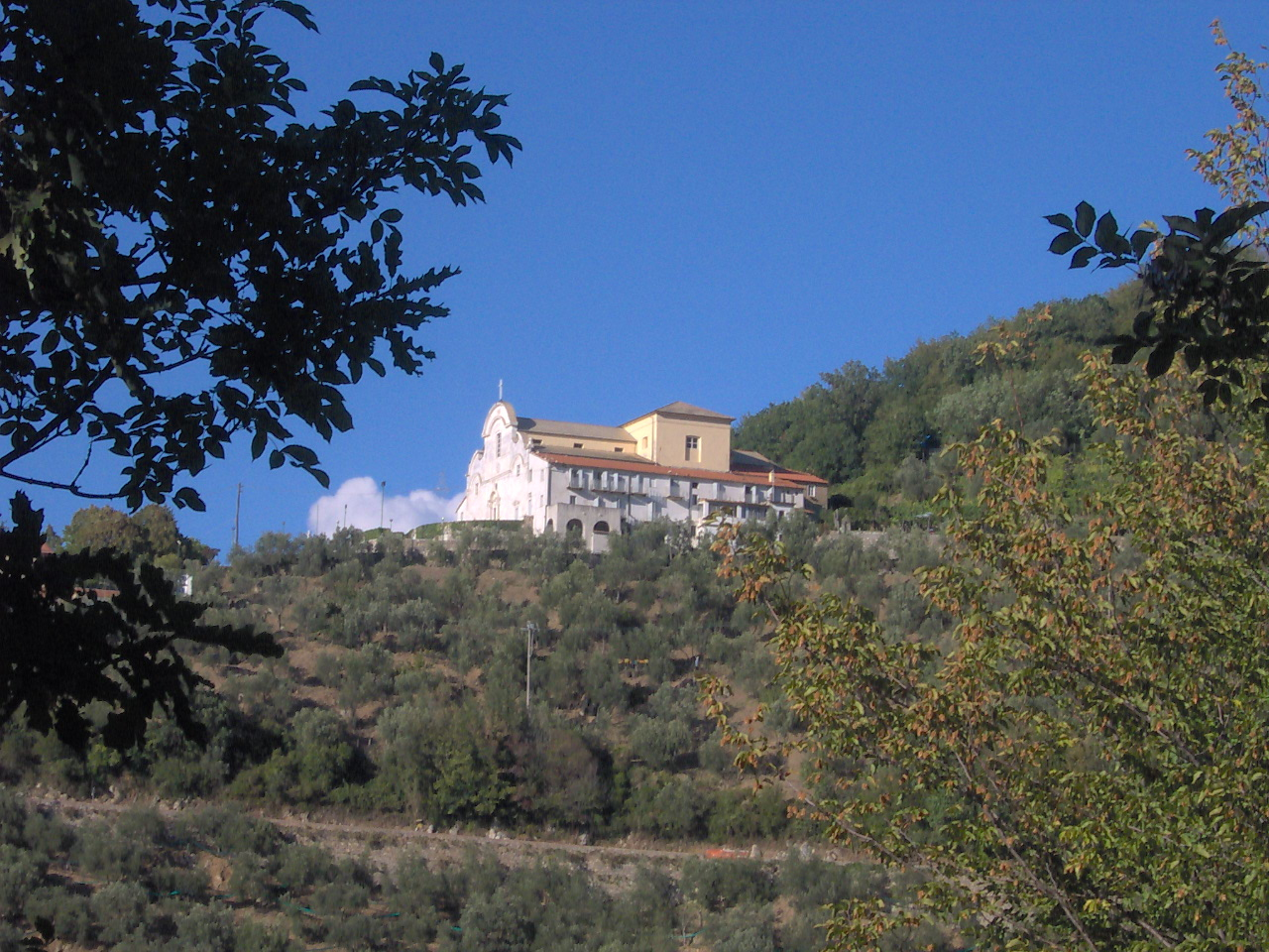 Ortonovo - Santuario della Nostra Signora del Mirteto